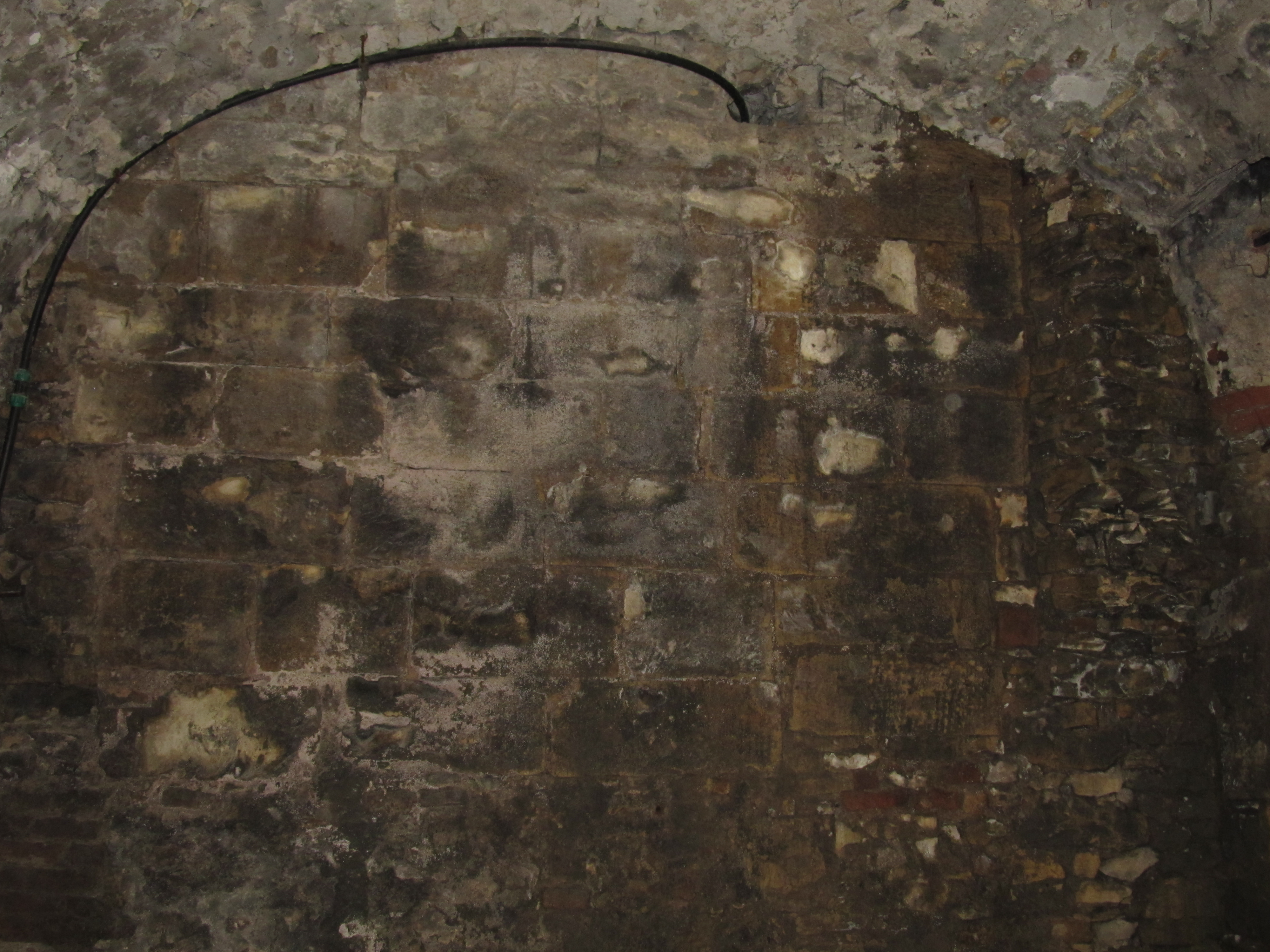 Sklep domu v Nerudově ulici č. 19, čp. 247. Pravidelně tesané kvádry jsou pozůstatkem Strahovské (Černé nebo Hansturkovské) brány.